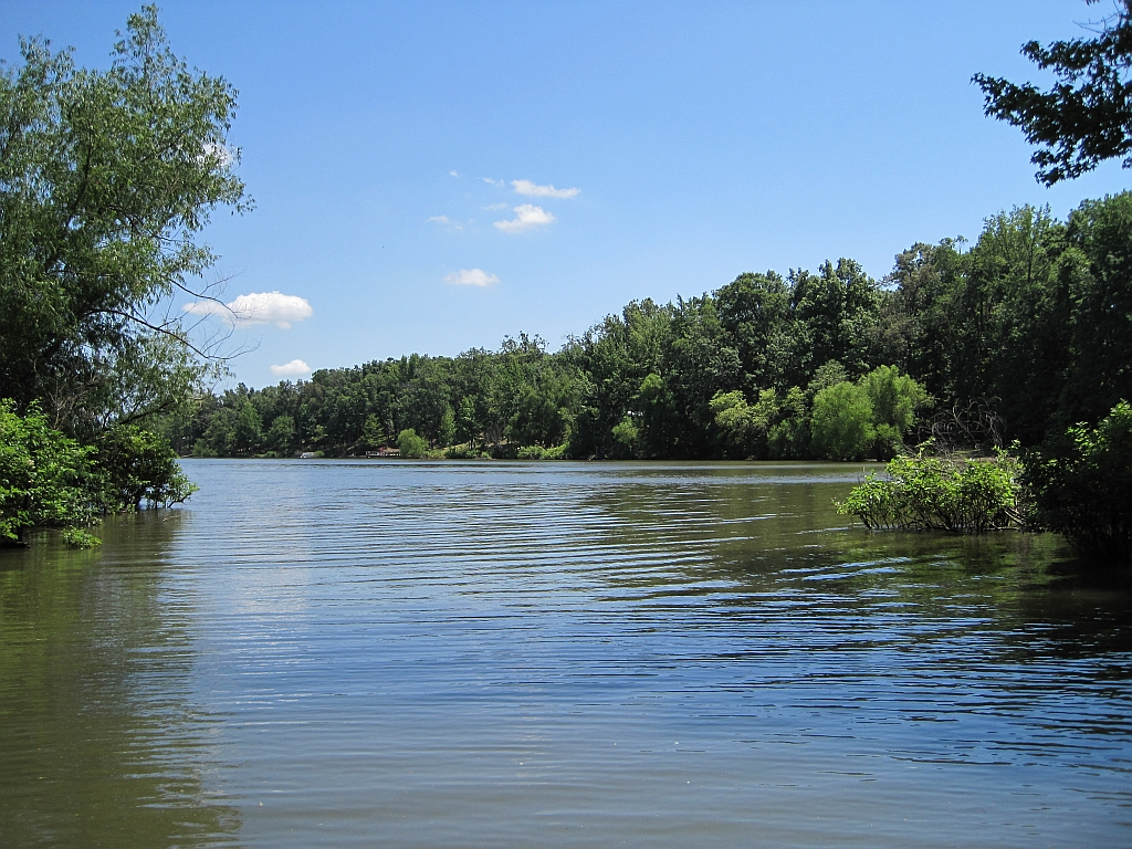 Lake Poinsett State Park, Arkansas